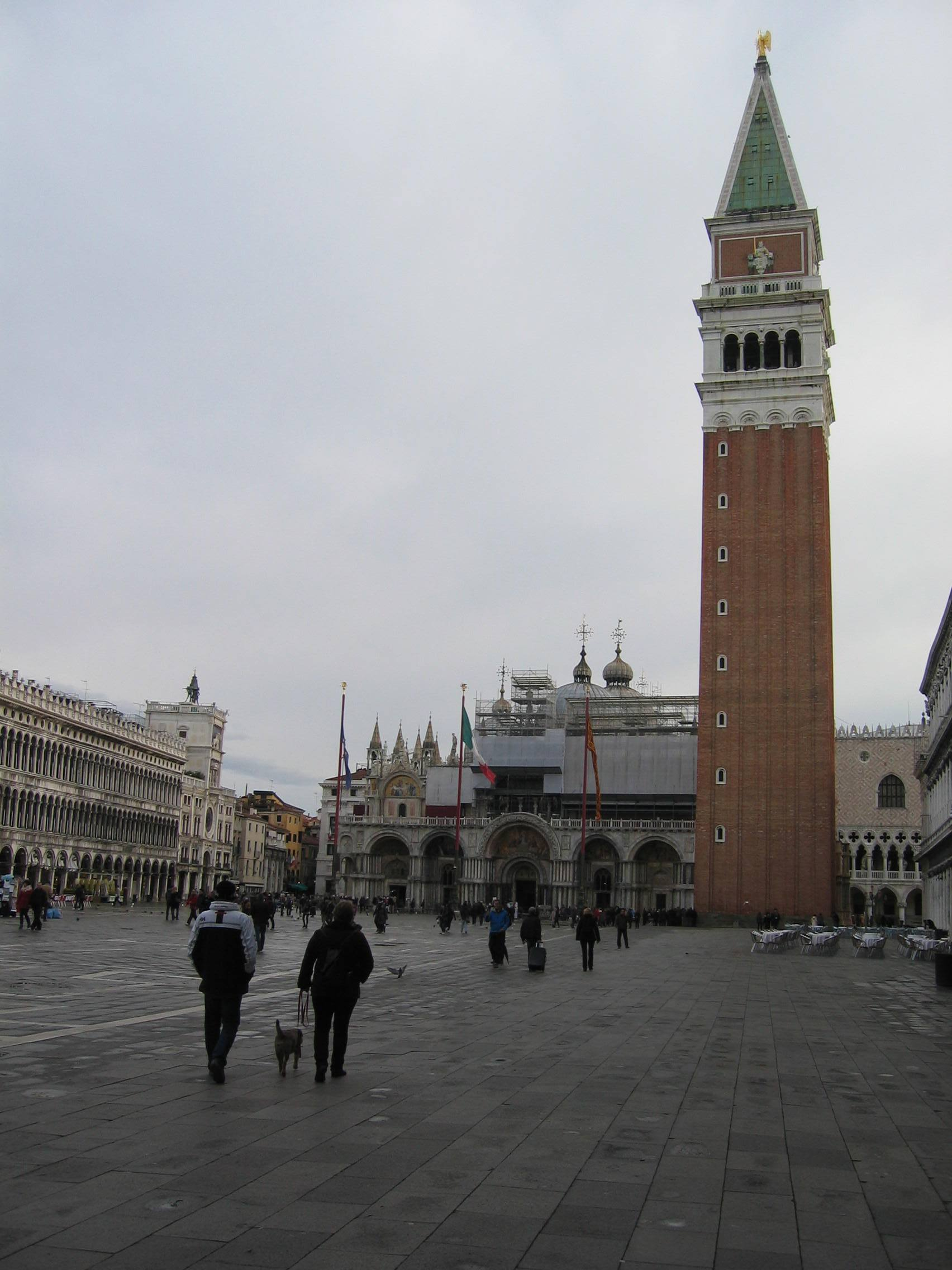 San Marco belltower